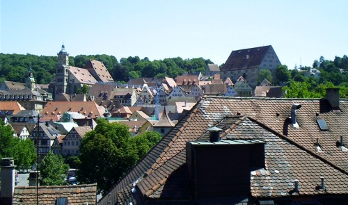 Bild von Schwäbisch Hall (Links im Hintergrund: St. Michael; Rechts im Hintergrund: Neubausaal) Blick auf die Altstadt von Schwäbisch Hall von der Kunsthalle Würth aus. Aufgenommen am 15. 7. 2003 v. W. Sommer.